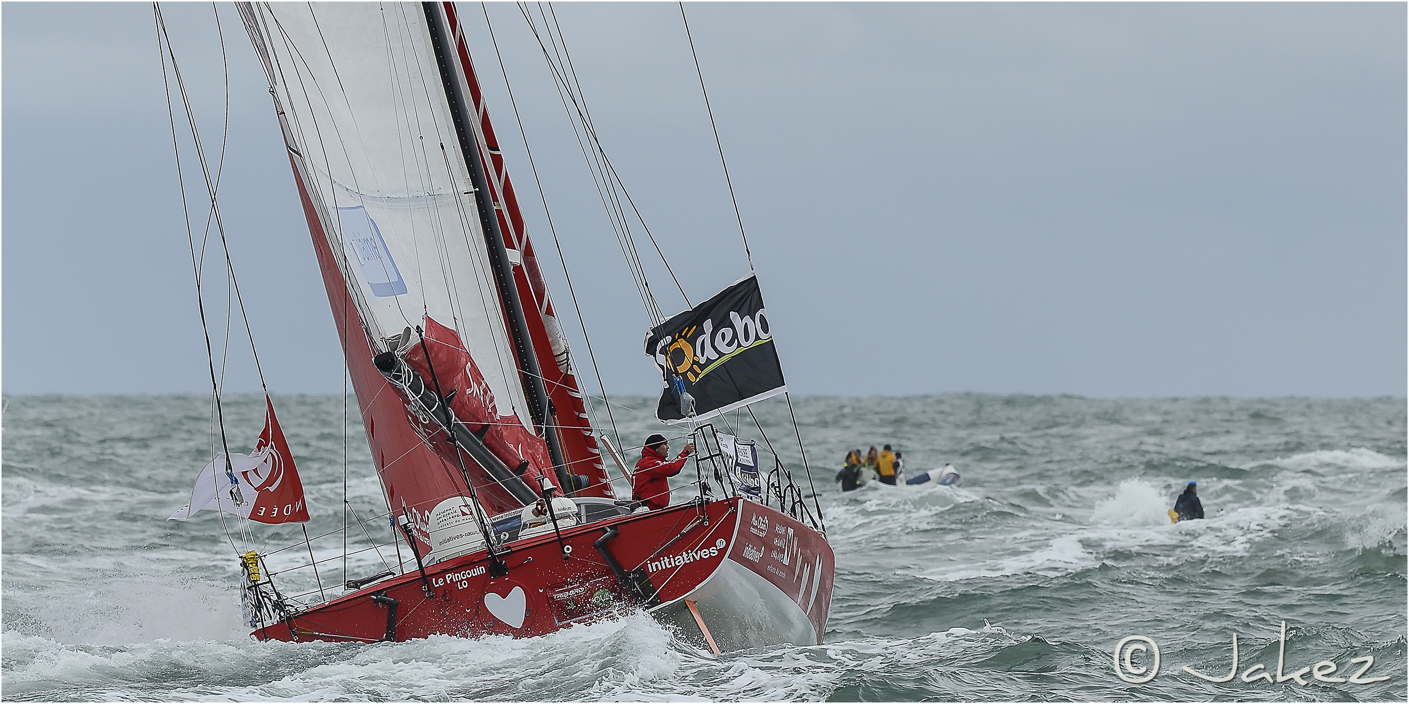 0600-Vendée 2012 (Départ)